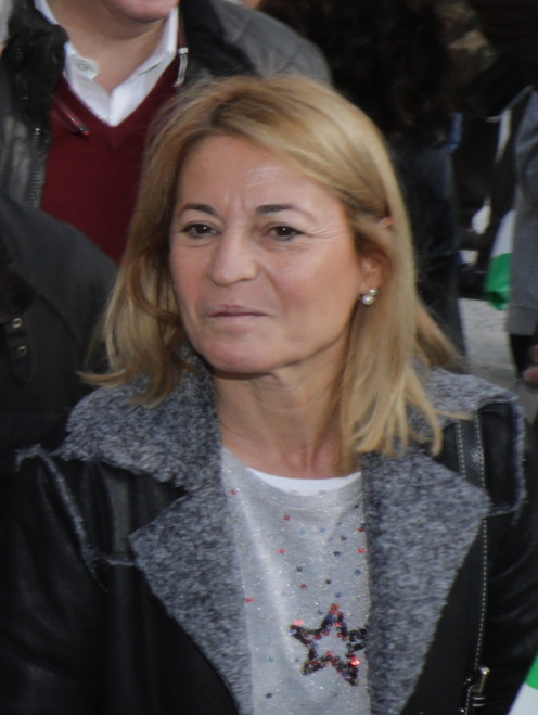 Concentración en apoyo de un tren digo para Extremadura.